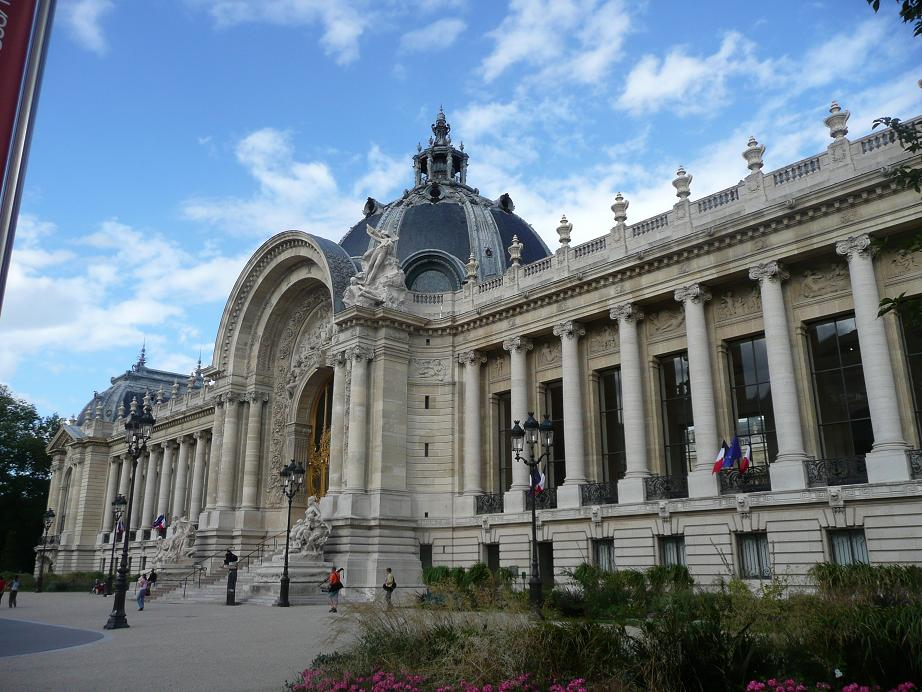 Le Petit Palais